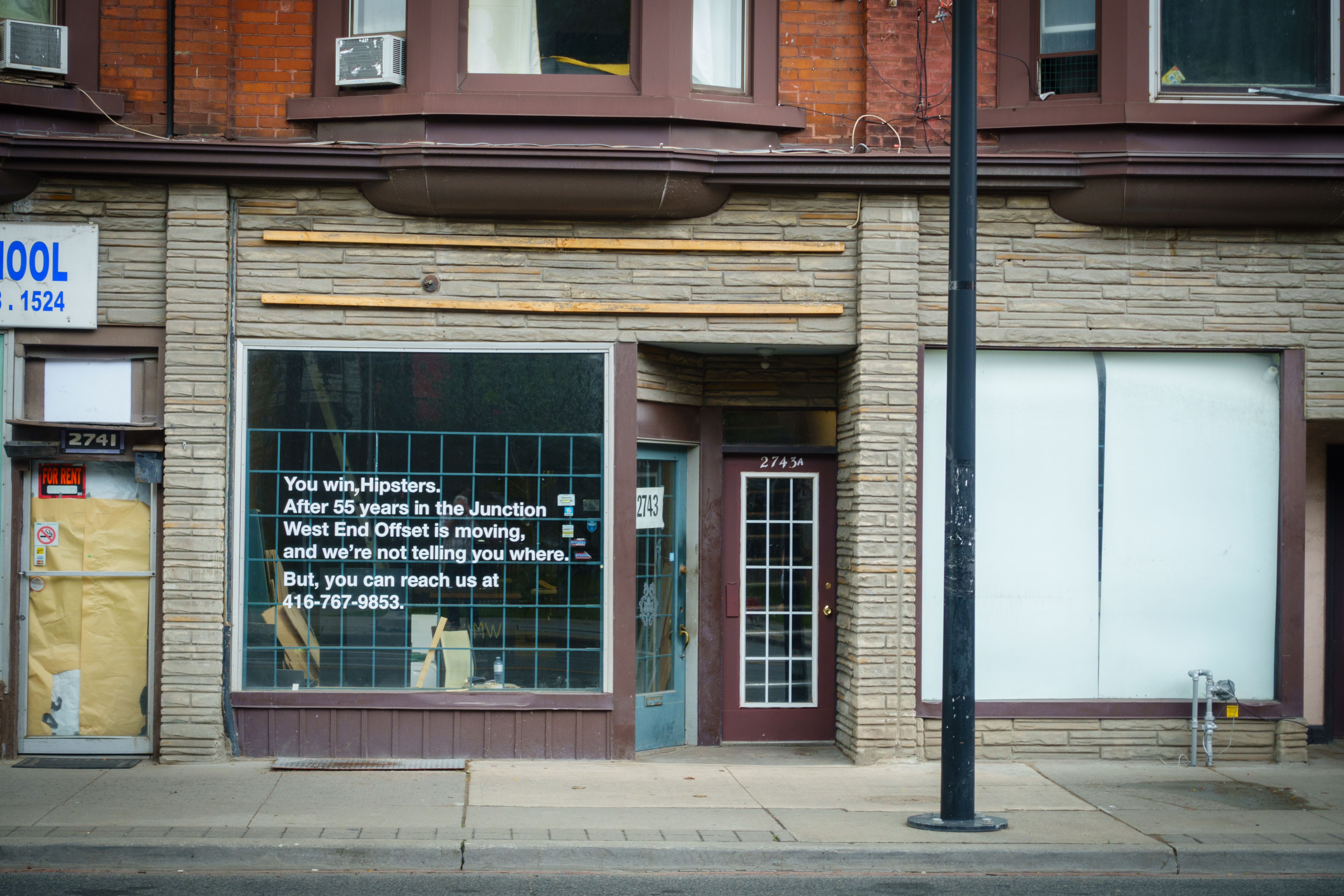 You Win, Hipsters